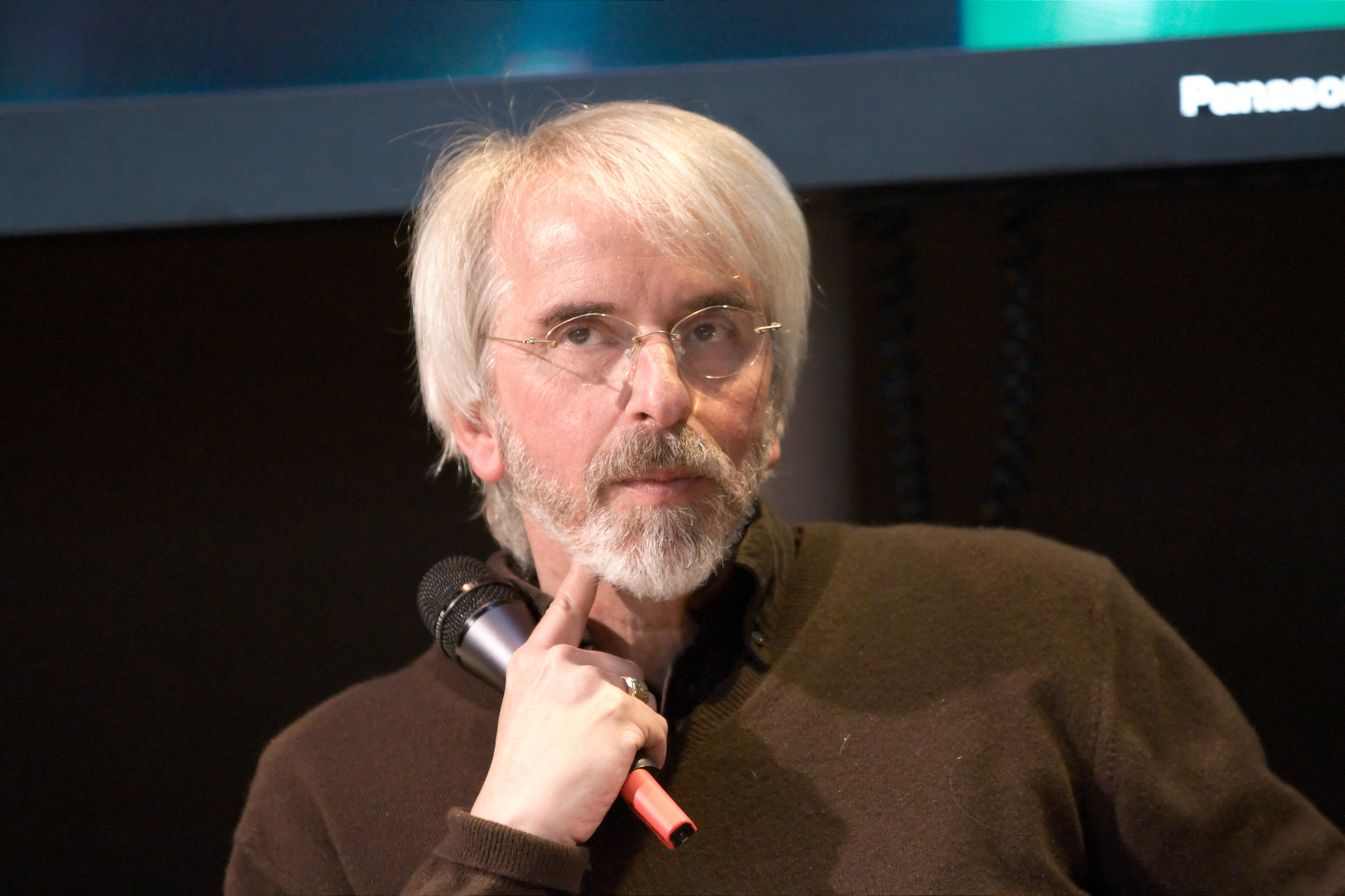 Philippe Delerm au Salon du livre de Paris lors de la conférence Dessine-moi un roman.